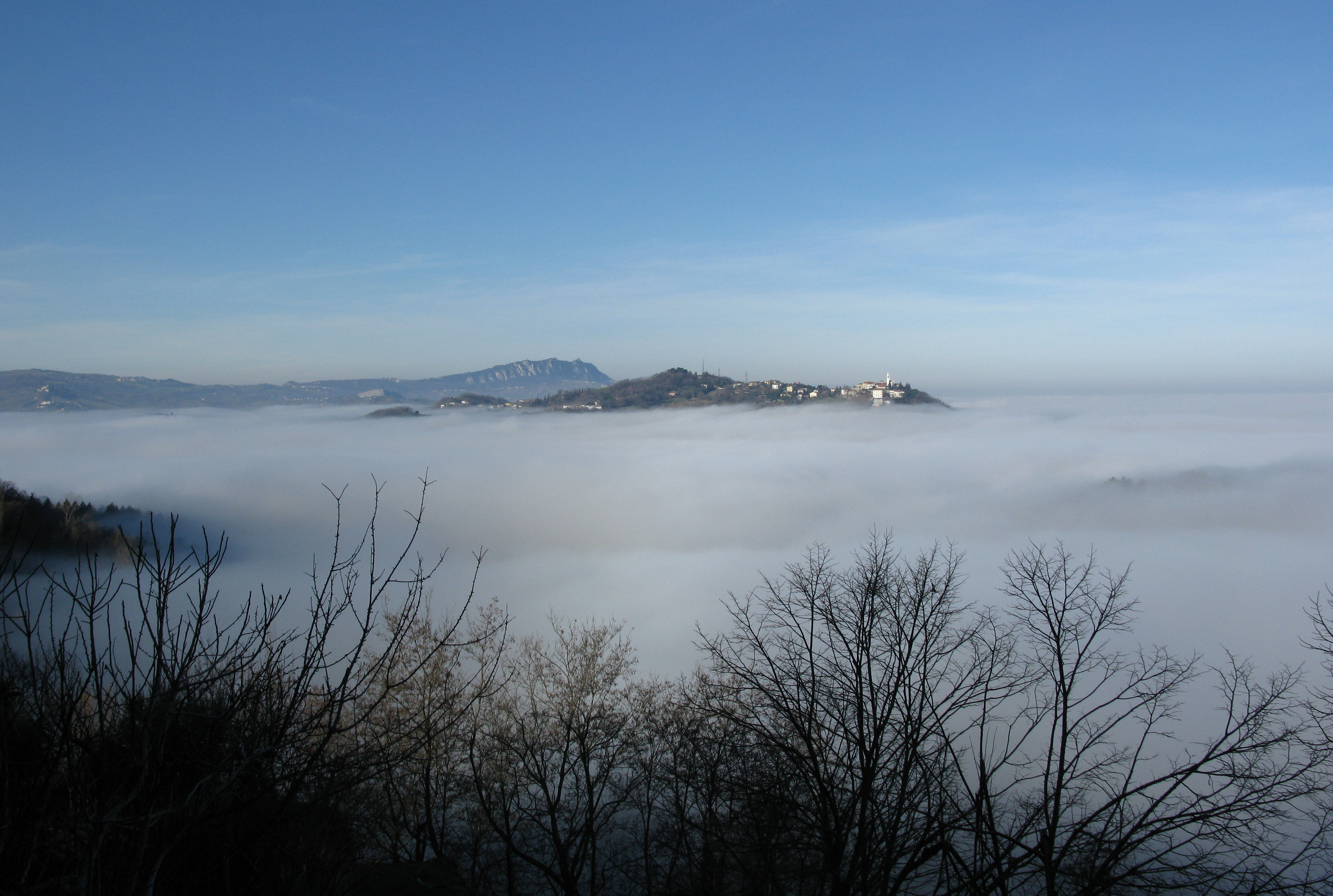 Panorama di Gemmano con la nebbia.